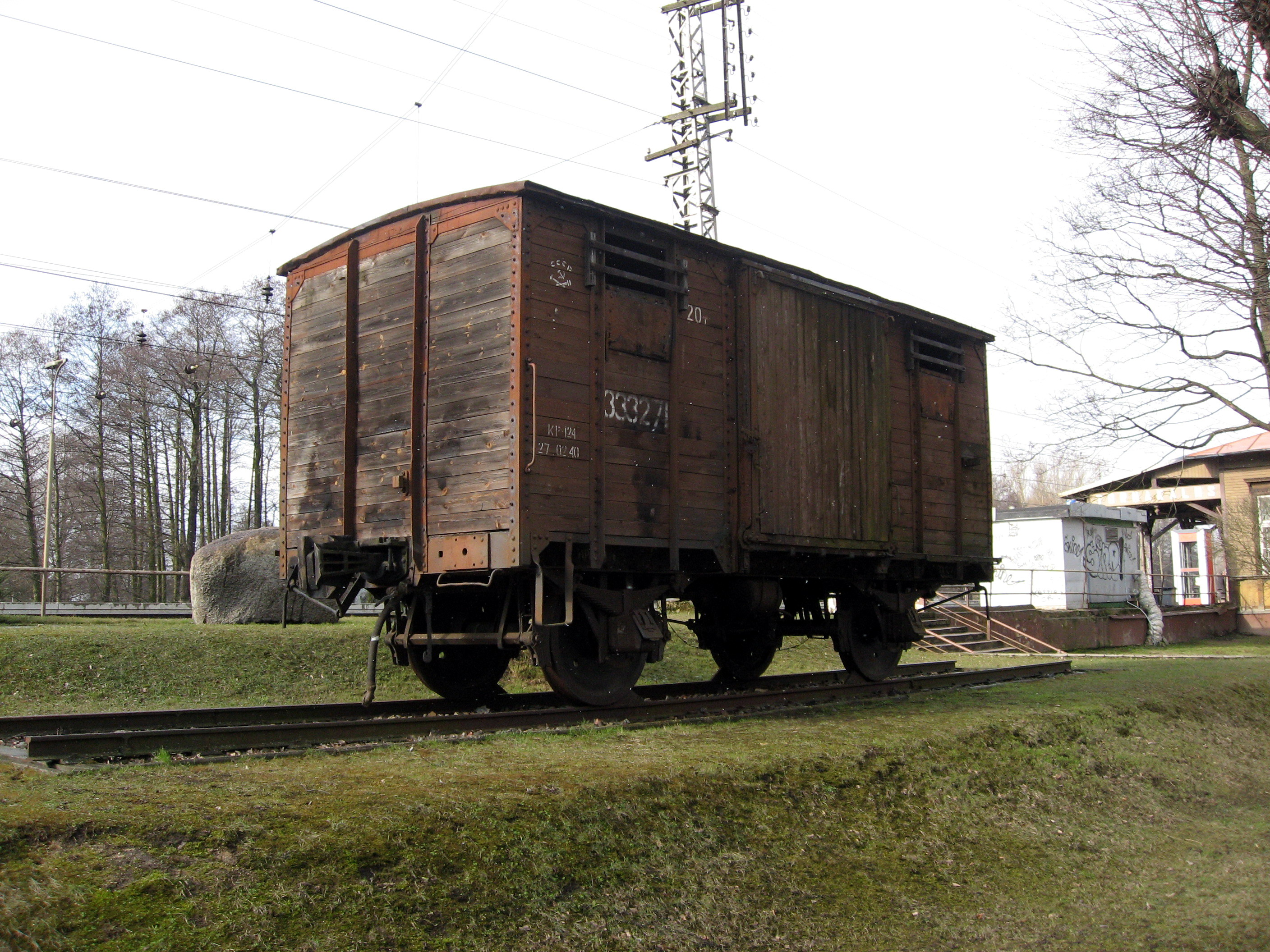 Riga, Torņakalns, památník obětem sovětských deporatací